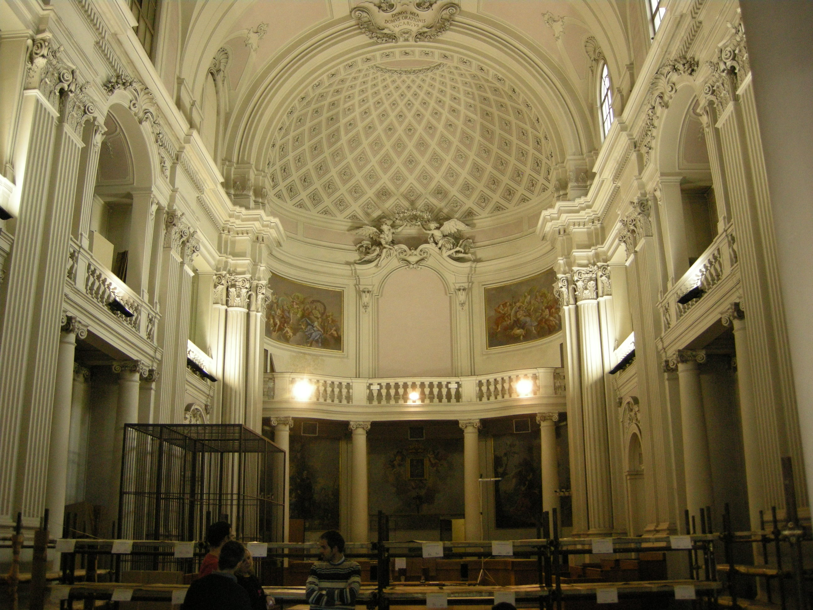 Oratorio dei filippini, firenze